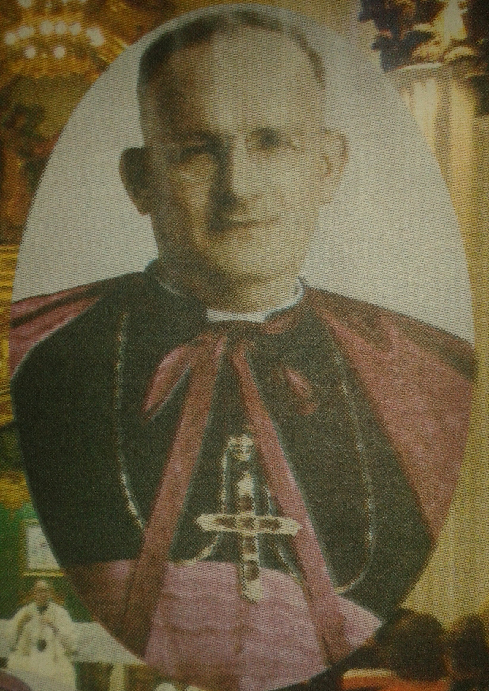 foto oficial